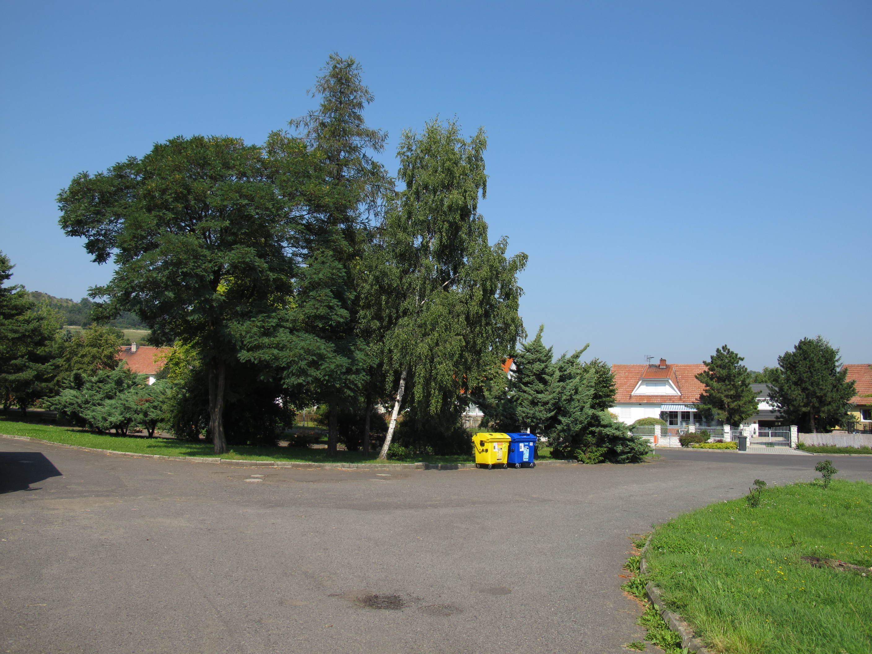 Osada Odolice